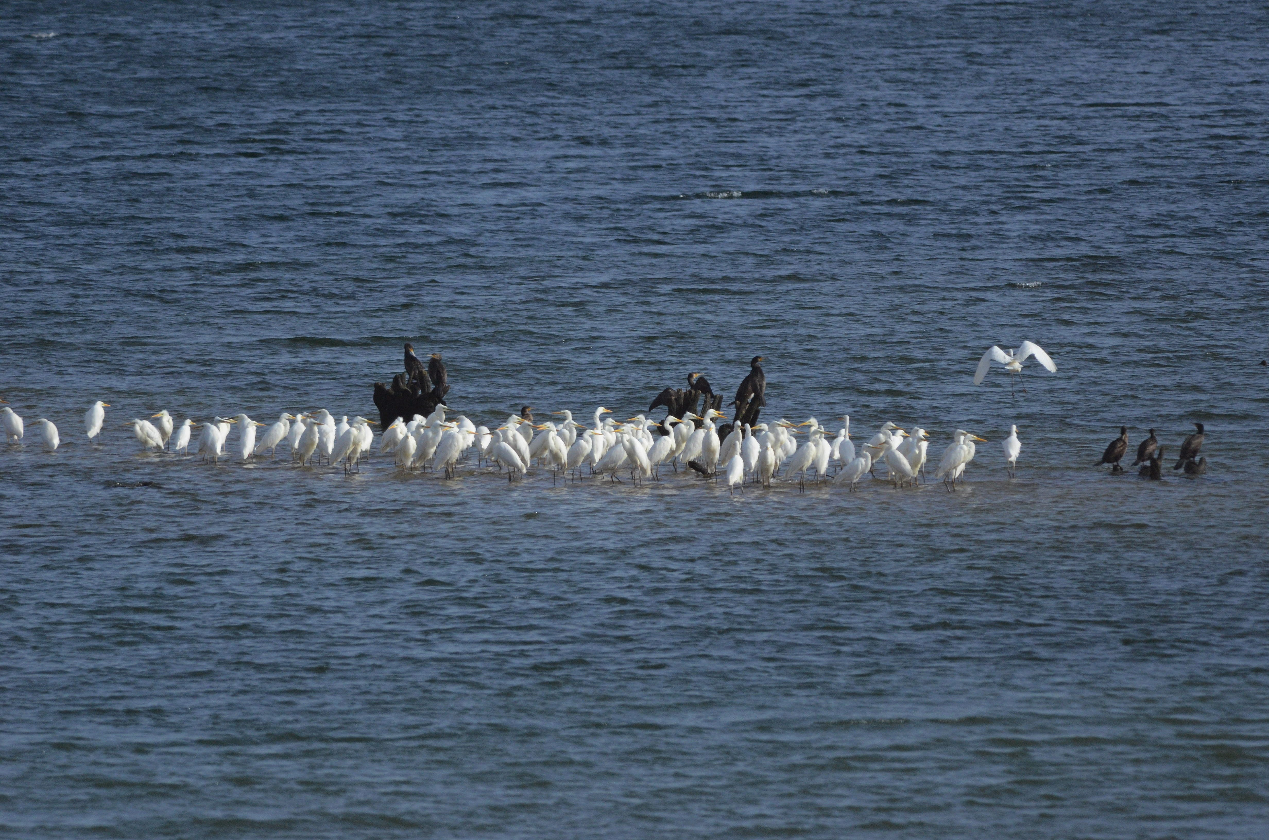 Зимувальні скупчення навколоводних птахів на Дністрі